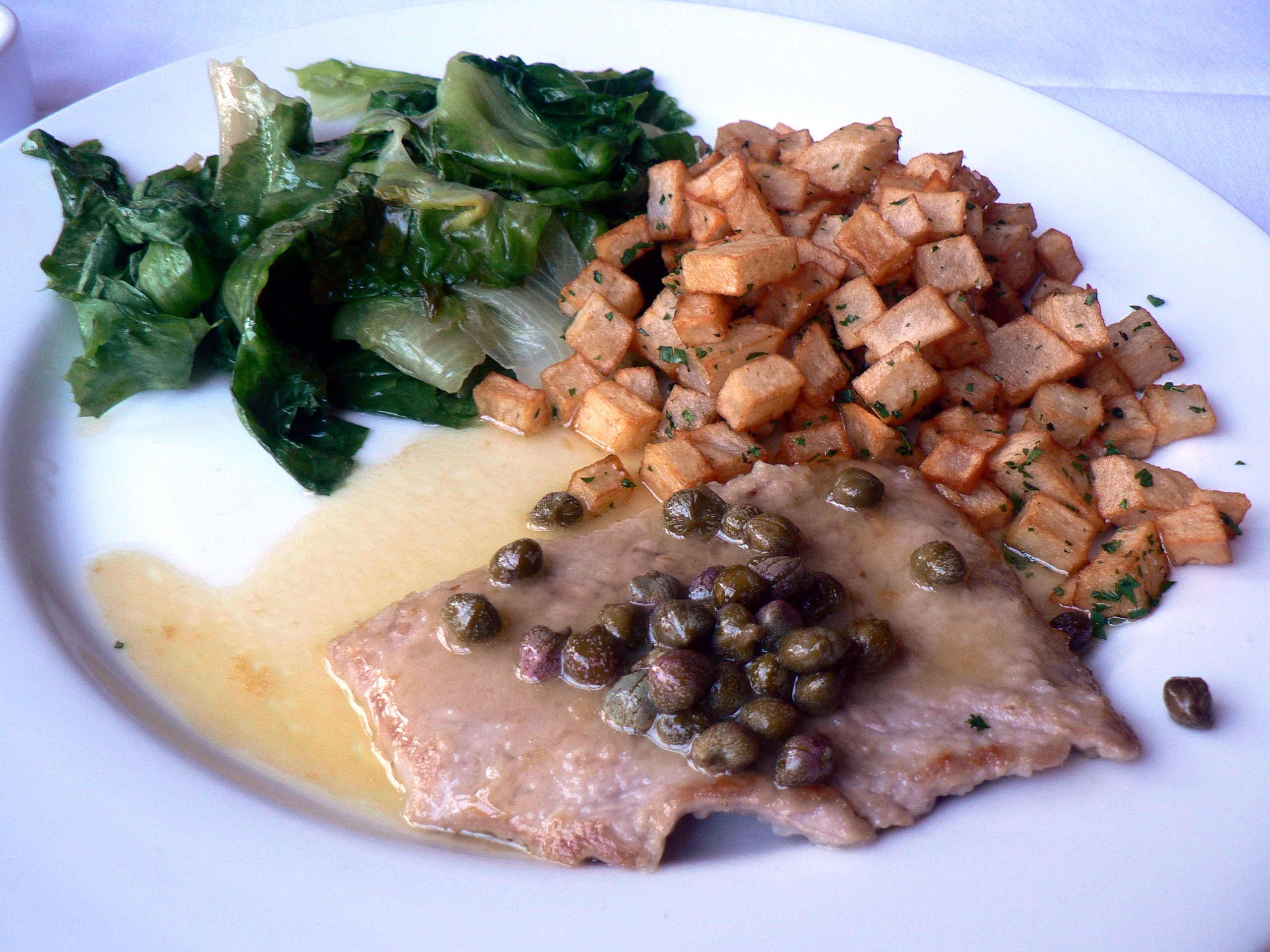 Veal piccata